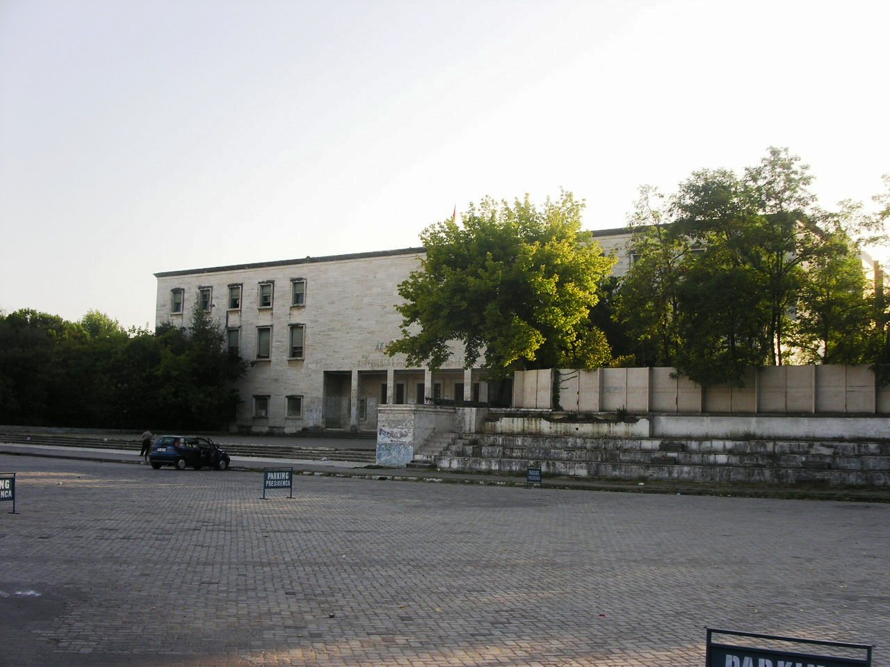 Akademia e Artevetë Shqipërisë, në Tiranë